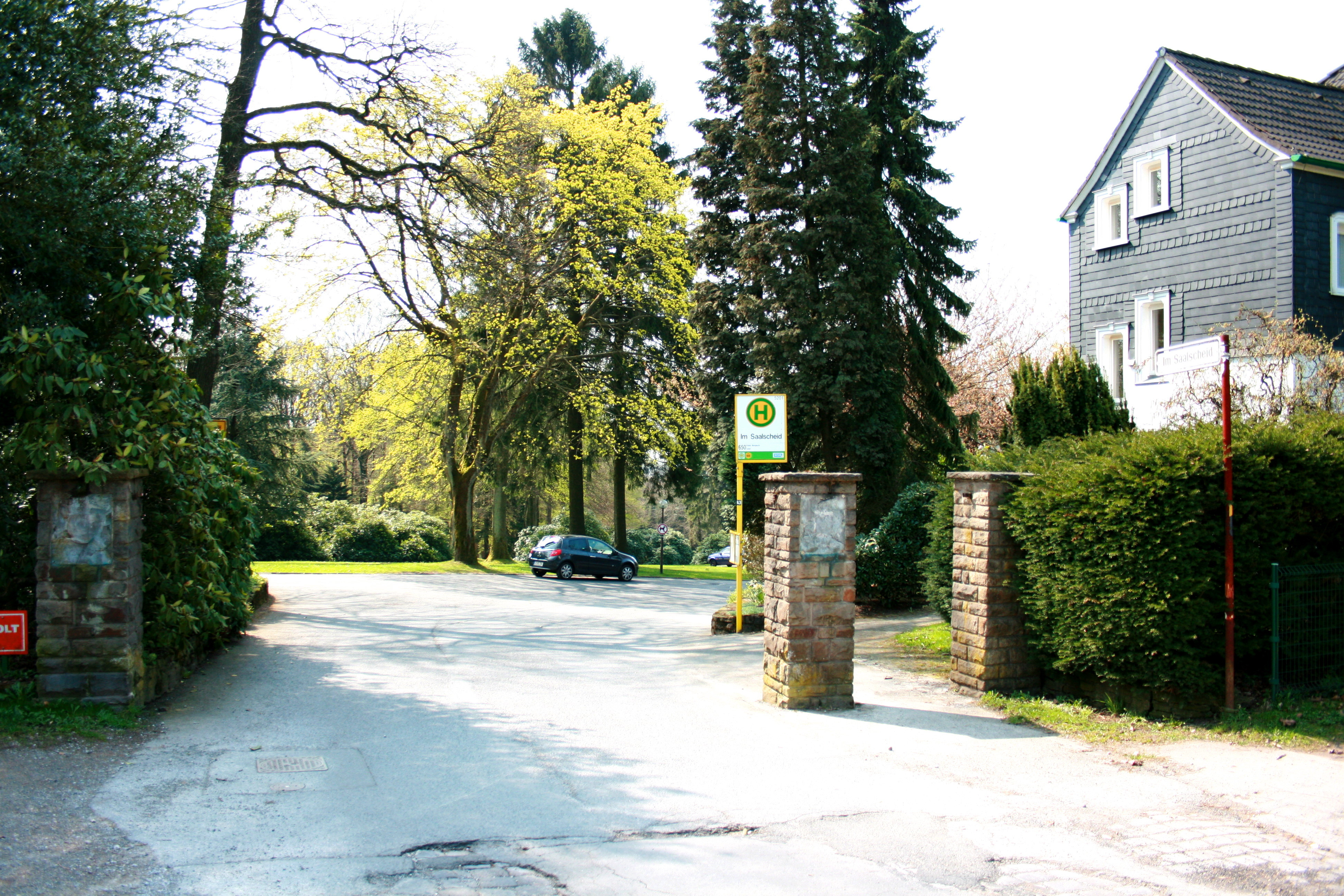 Im Saalscheid in Wuppertal-Ronsdorf